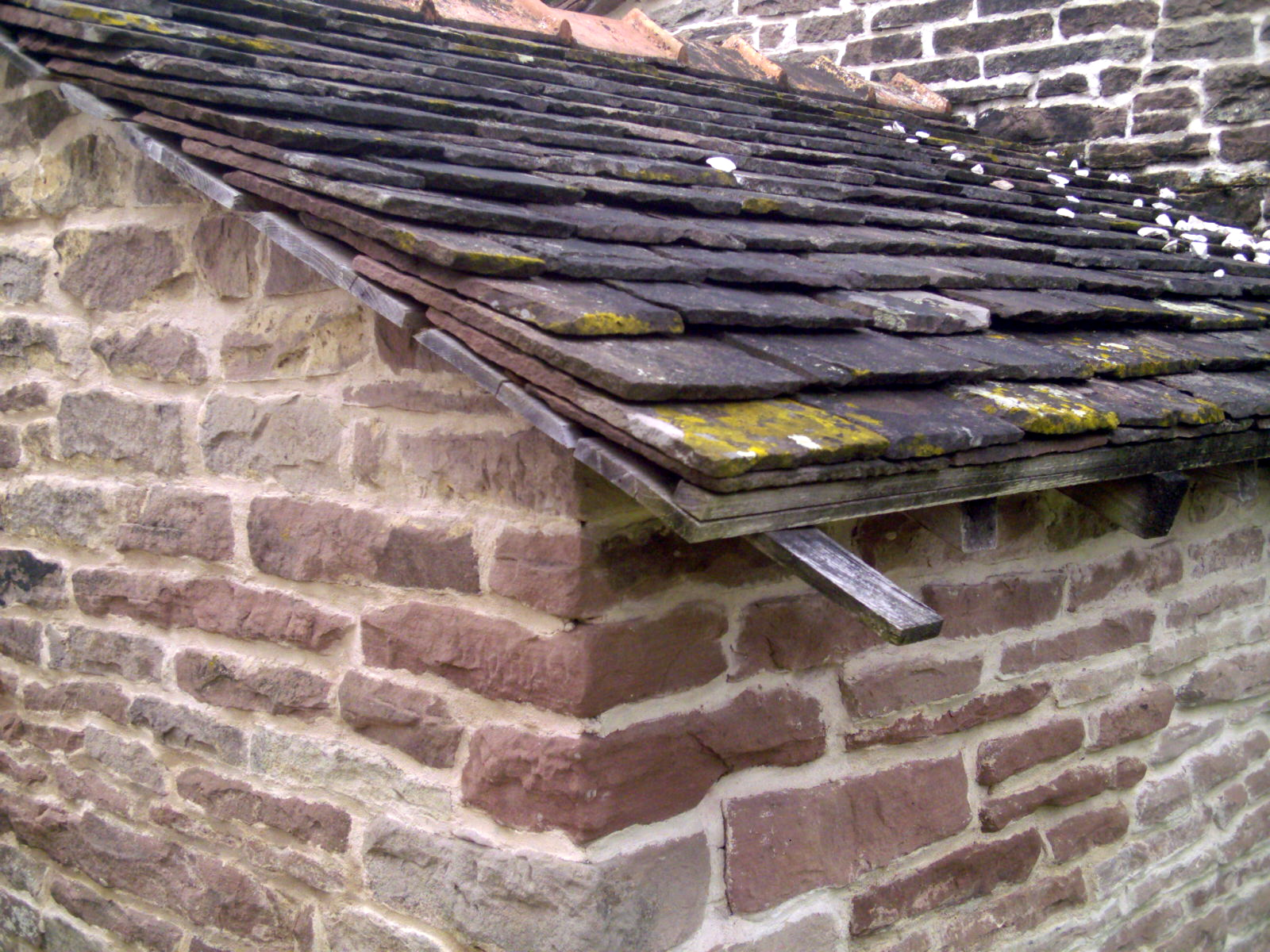 Toit en Laves de grès, commune de Les Voivres (88)